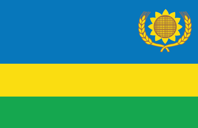 Прапор Нововоронцовського району